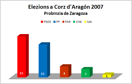 Aragonés: Grafico d'as elezions a Corz d'Aragón de la añada 2007